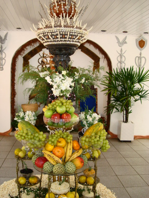 Assentamento do Orixá Obaluaye, Salvador, Bahia, Brasil.